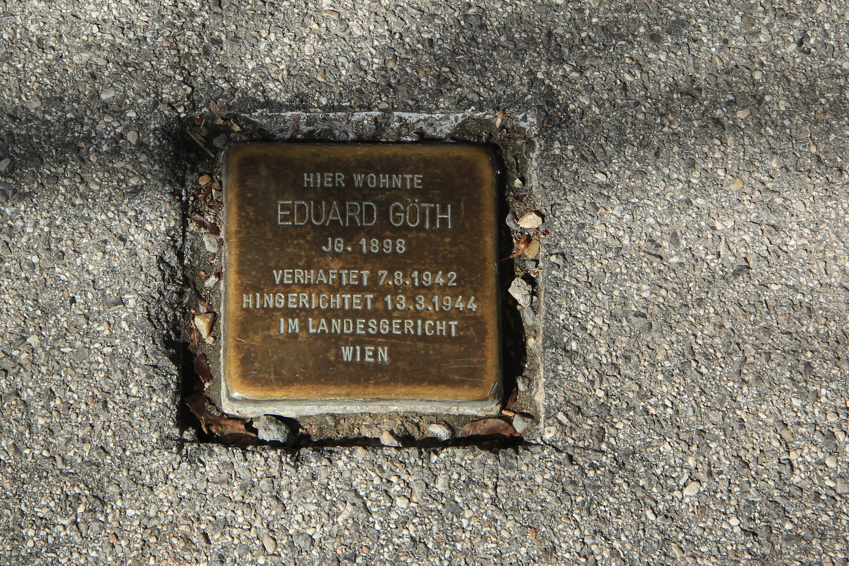 Stolperstein für den Widerstandskämpfer Eduard Göth in der Hinterbrühl, Hauptstraße 70b, Niederösterreich